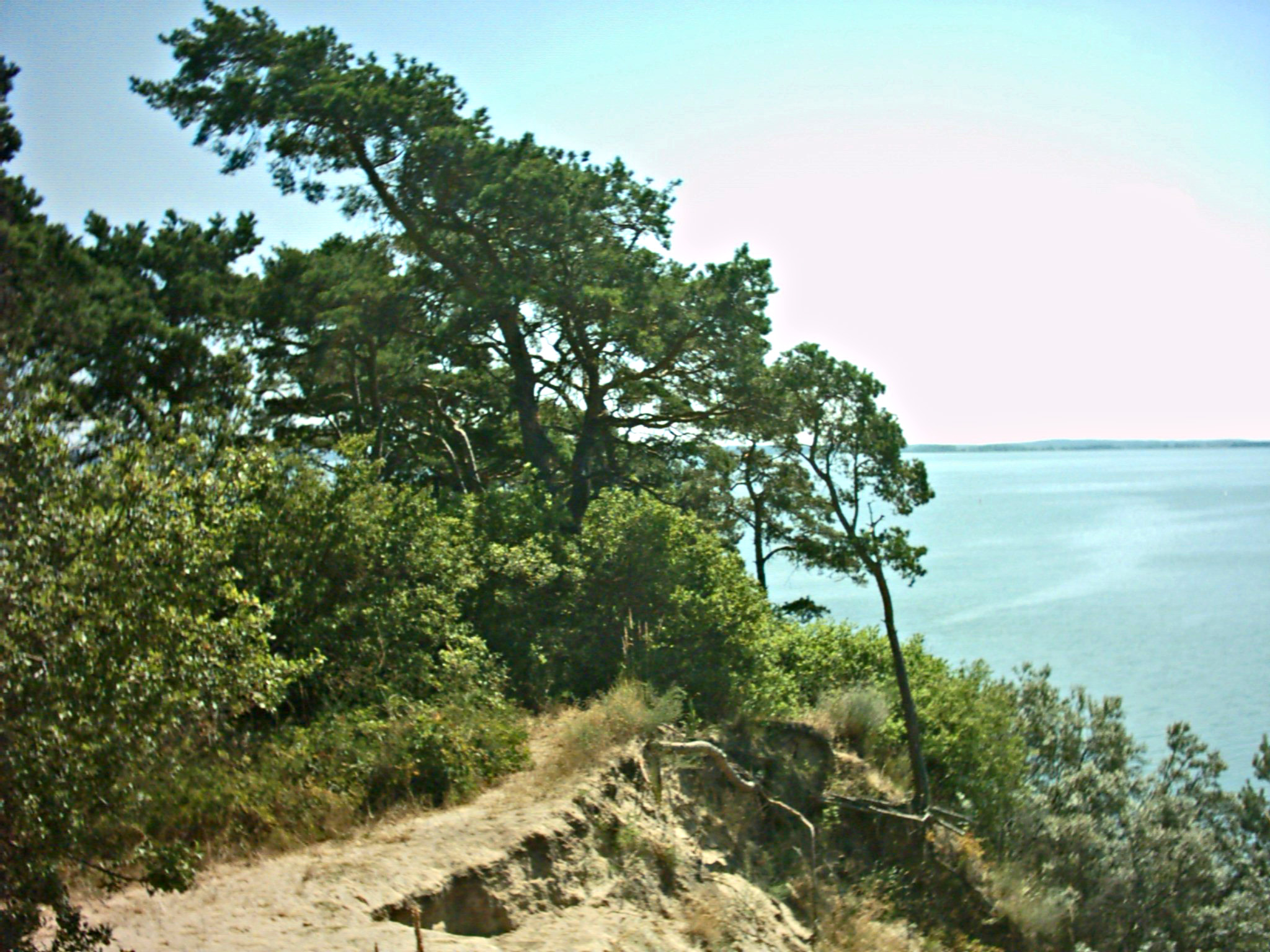 Loddiner Höft am Achterwasser in Loddin (Usedom), Deutschland.